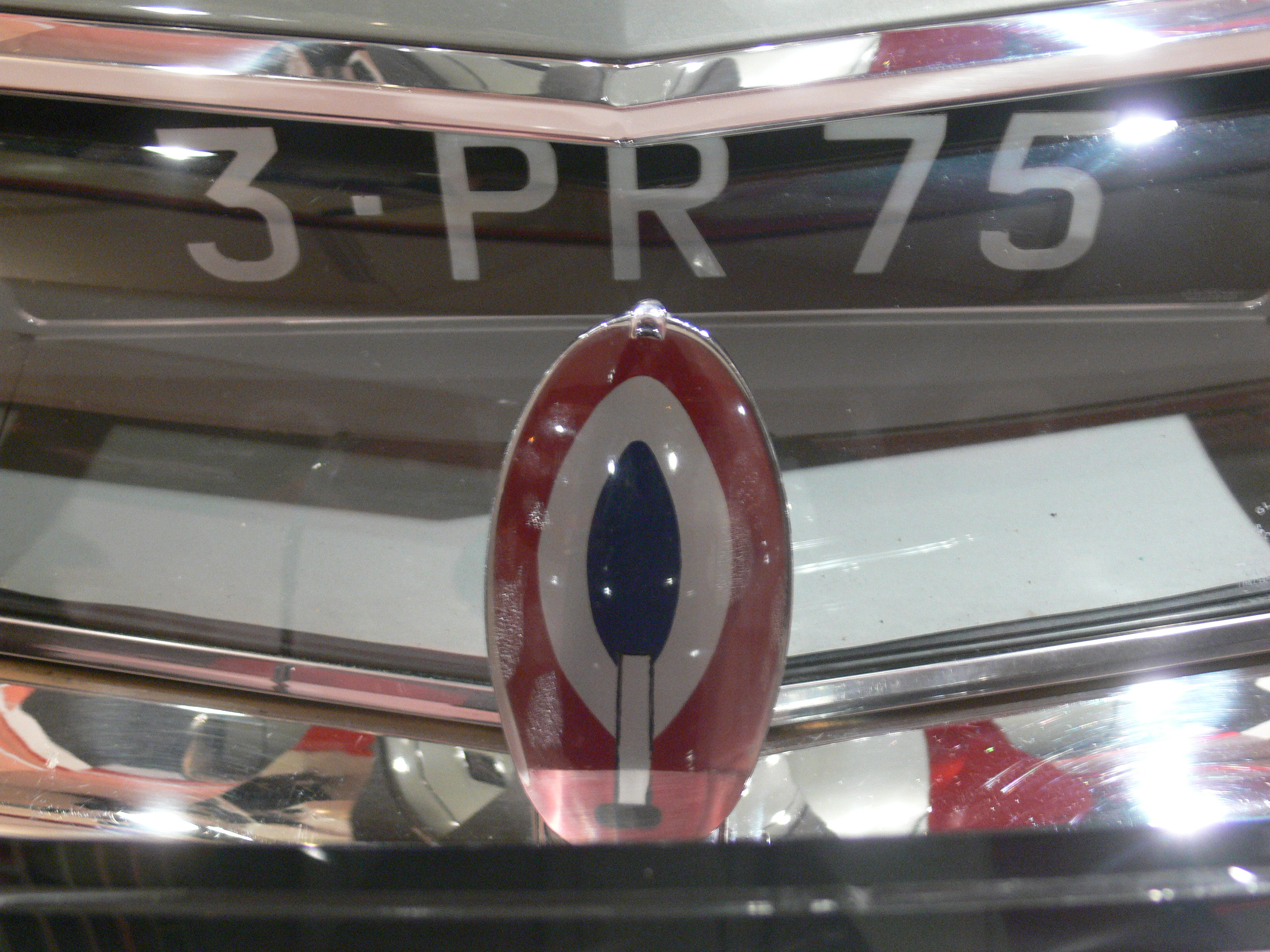 Citroën SM présidentielle